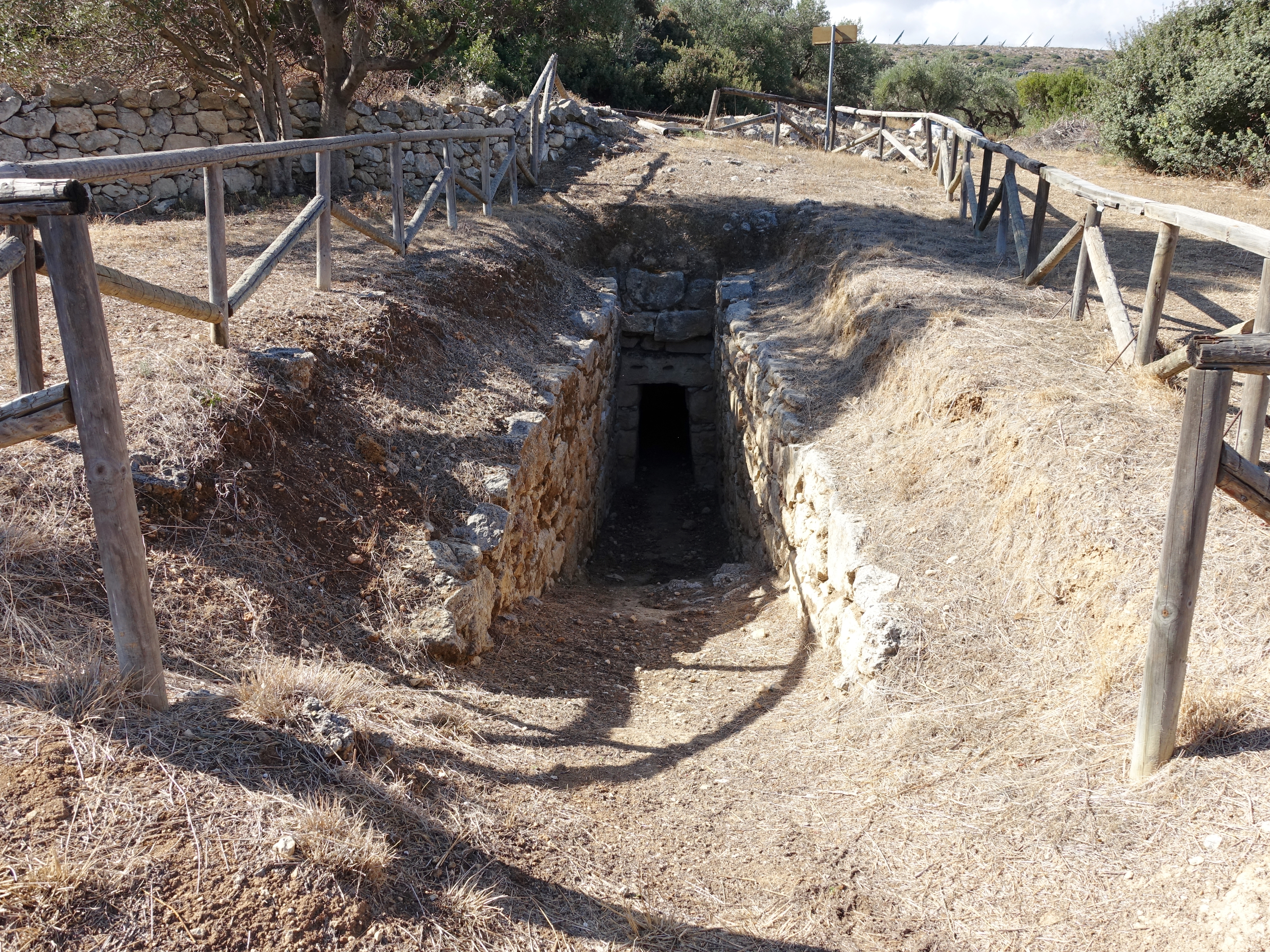 Tholos-Grab von Platyskinos bei Achladia (Πλατύσκινος, Αχλάδια Σητείας), Gemeinde Sitia, Kreta, Griechenland